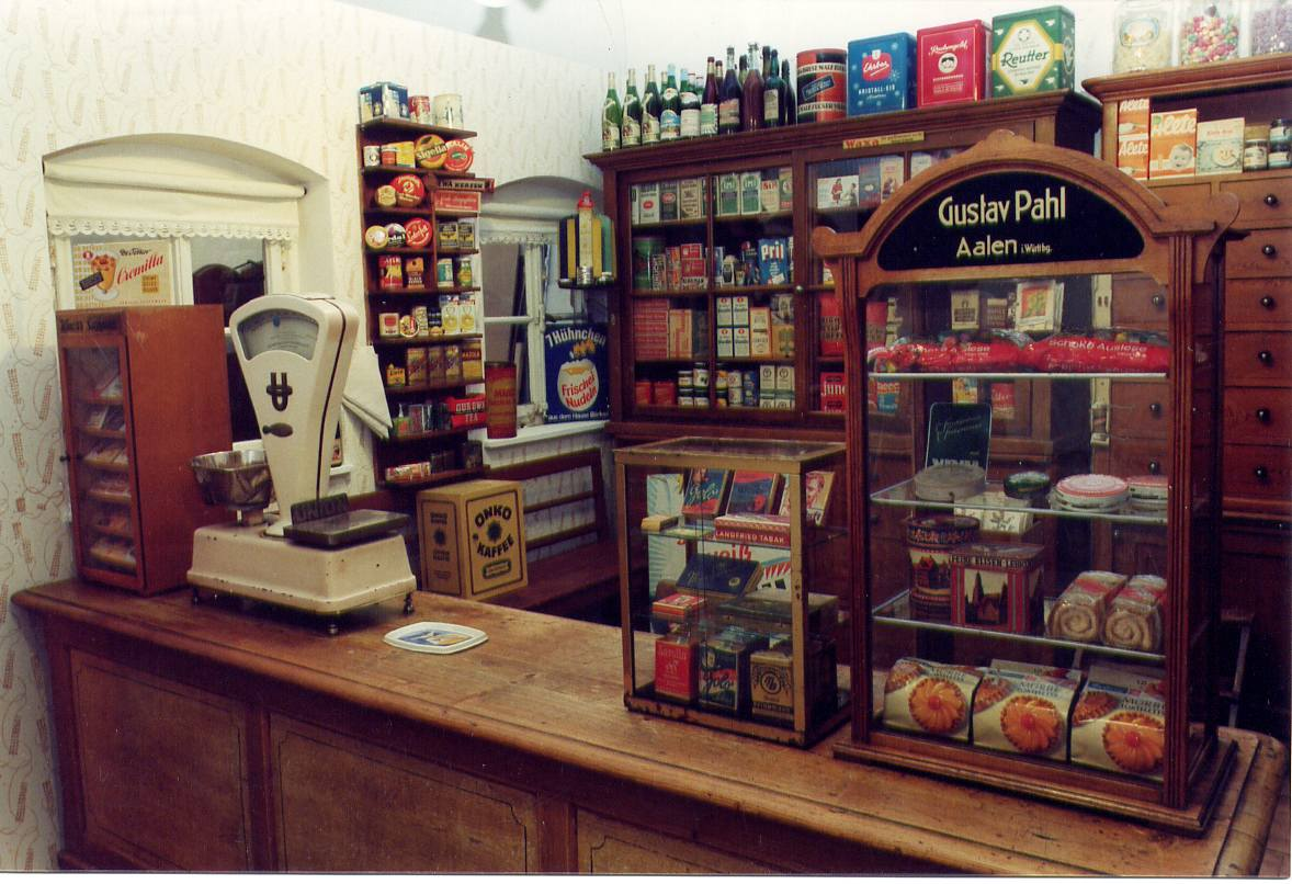 Tante Emma Laden Maihingen